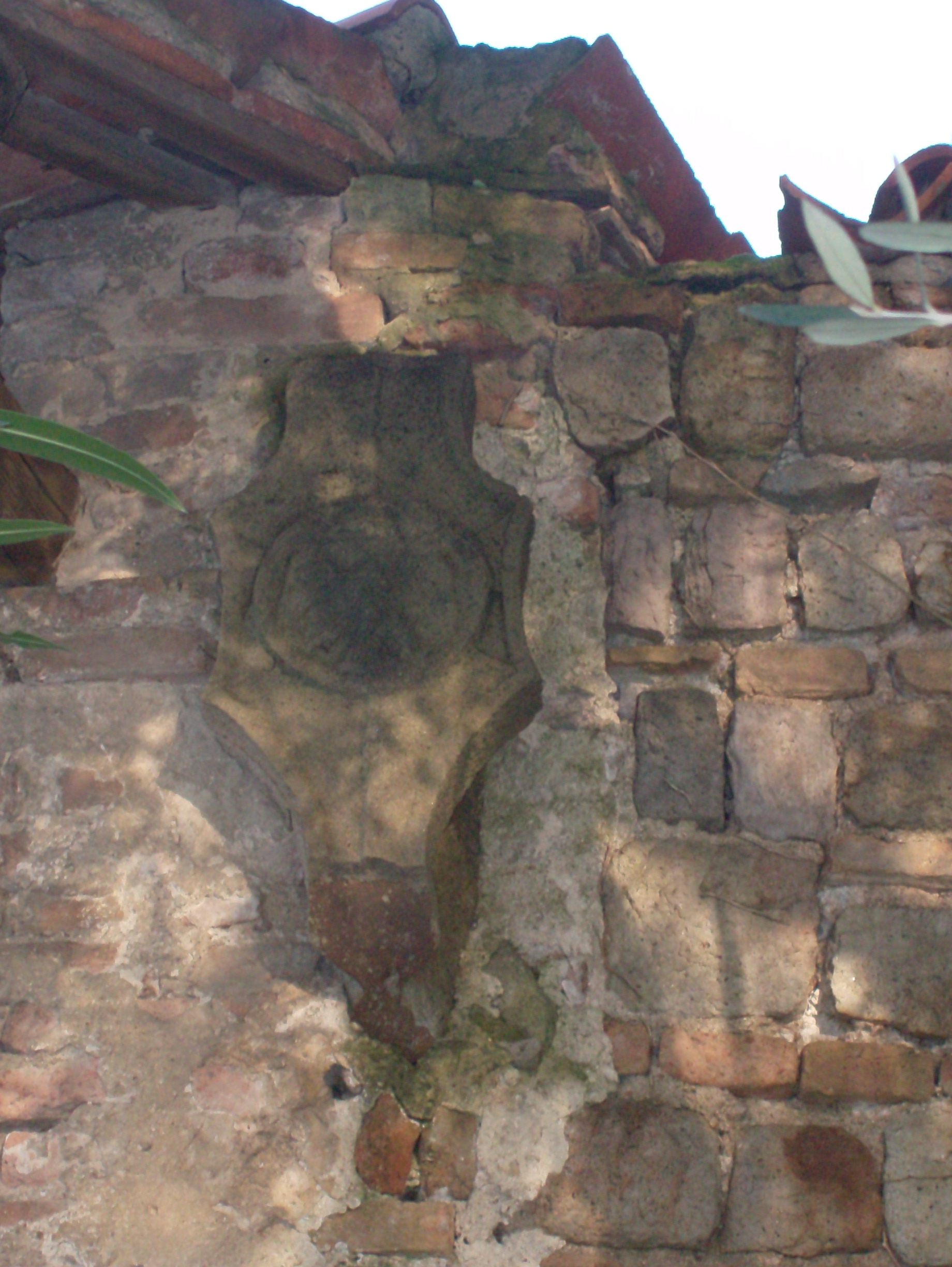 Stemma della famiglia Aliprandi all'ingresso del Castelletto di Torreglia (Padova)